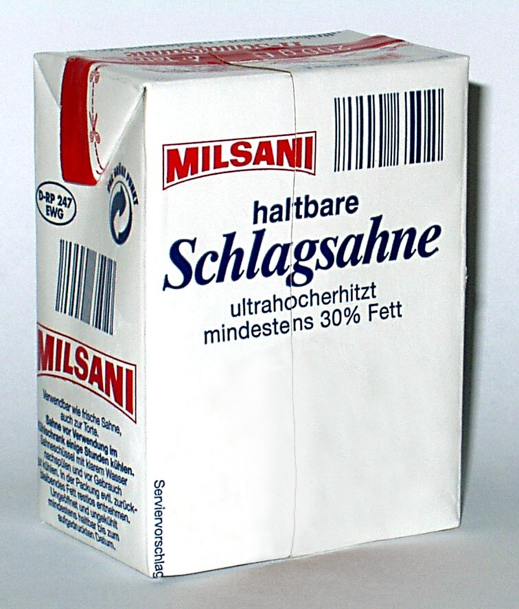 Getränkekarton für Sahne von der Firma SIG Combibloc